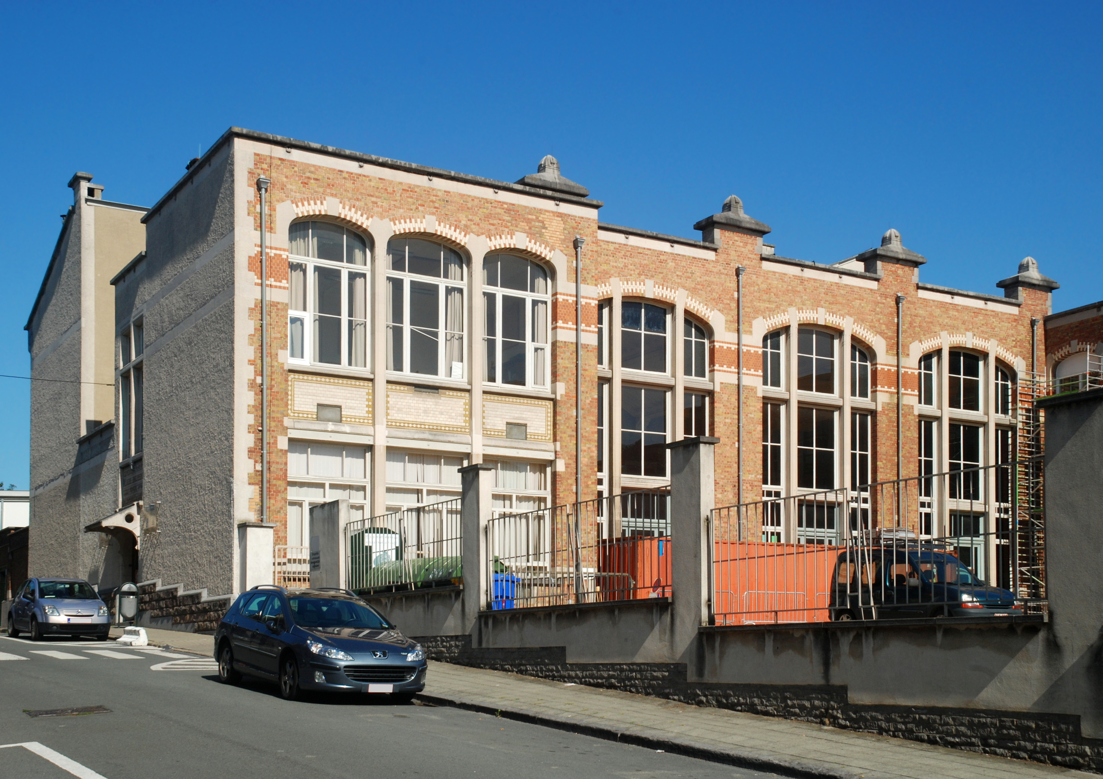 Belgique - Bruxelles - Centre scolaire du Souverain